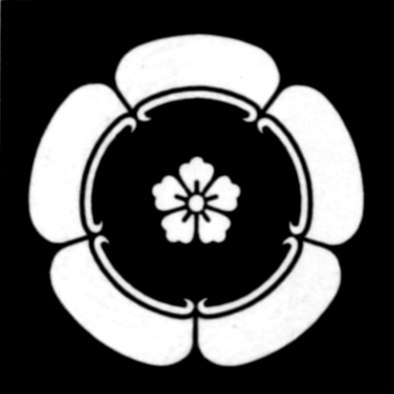 五つ瓜輪に唐花